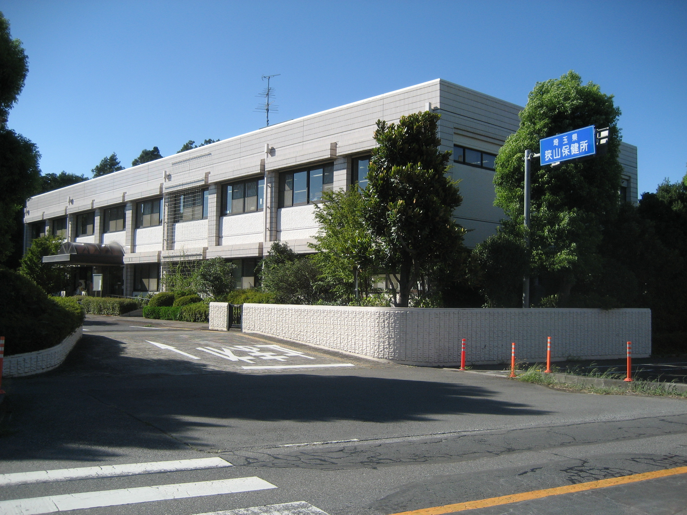 埼玉県狭山保健所